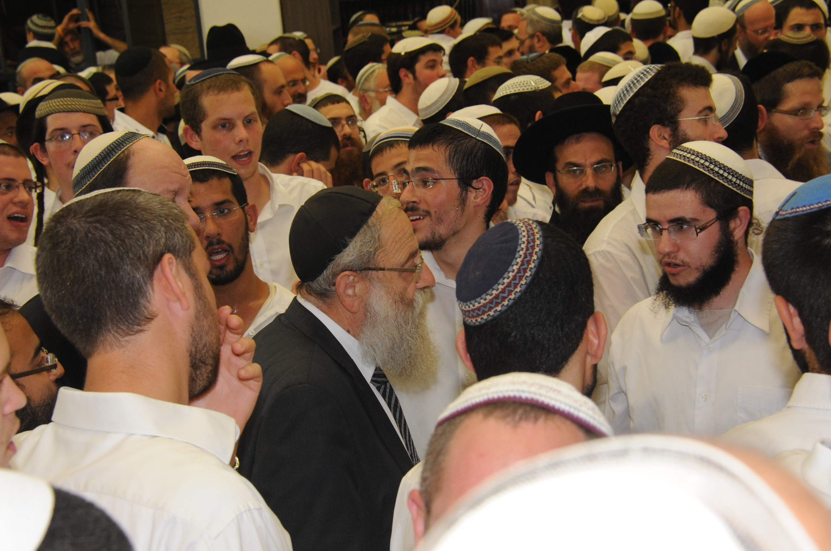 הרב אריה שטרן